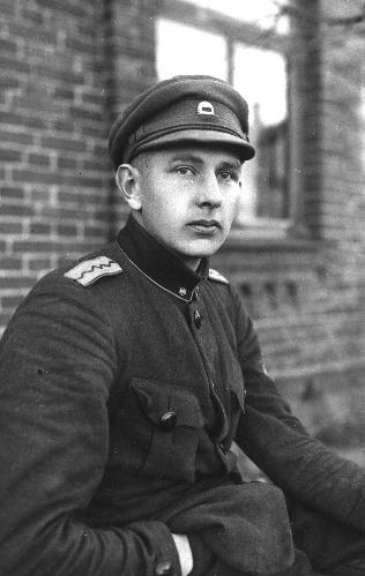 Alampolkovnik Oskar Luiga 1920. aastal, mil ta oli Kalevlaste Maleva polguülem.